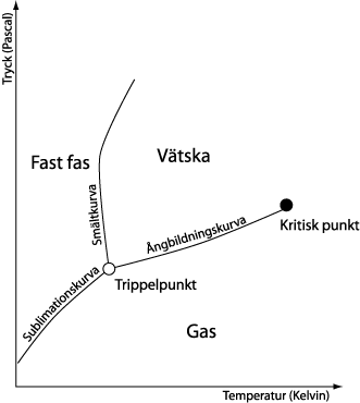 Fasdiagram, ritat av Rogper.